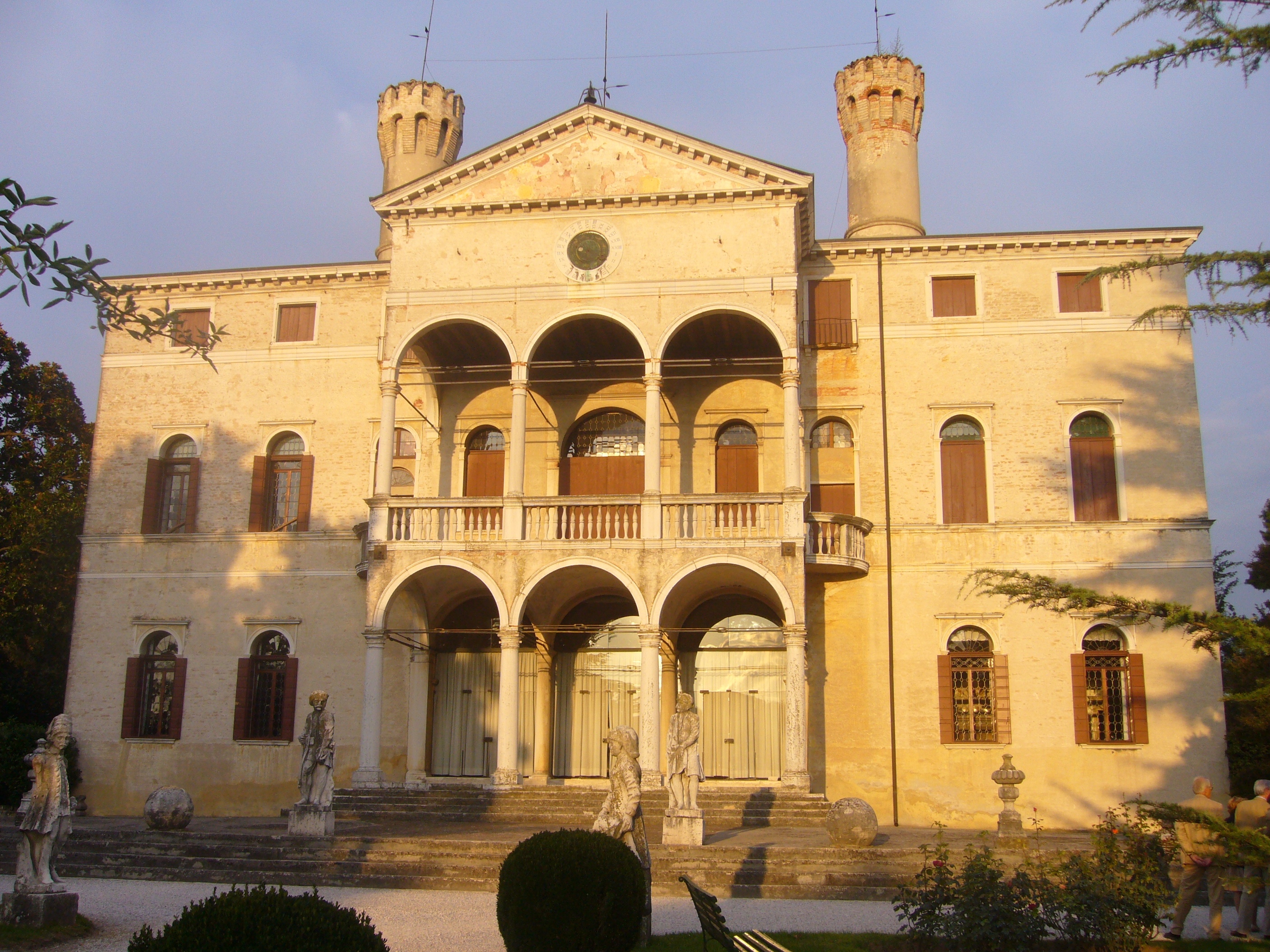 Kasteel Roncade